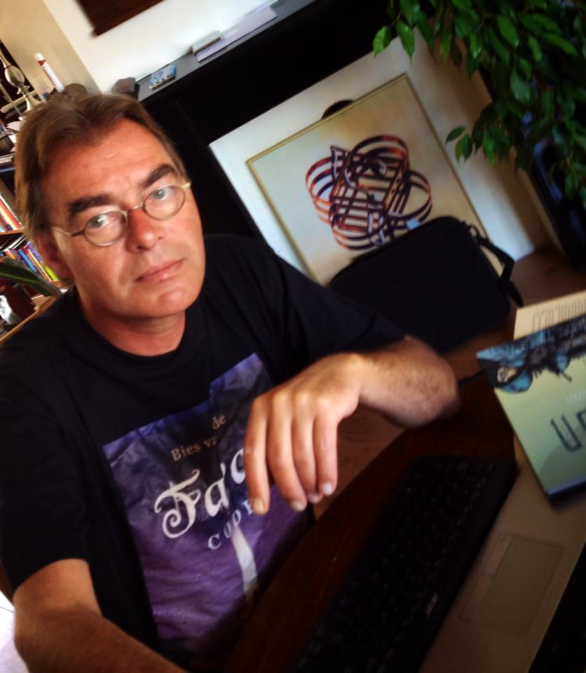 Bies van Ede